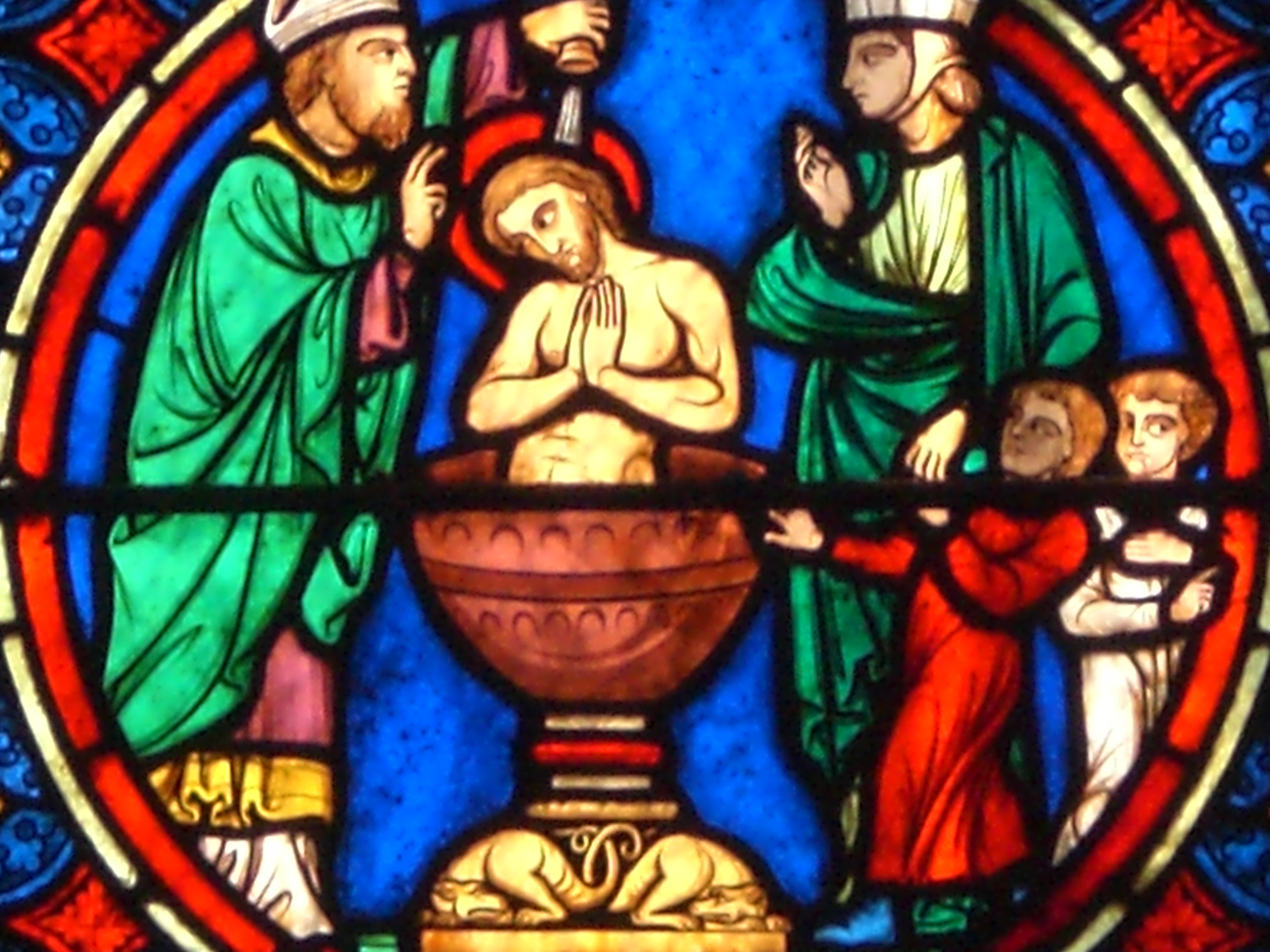 Un vitrail de la cathédrale Notre-Dame de Paris